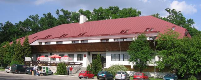 Współczesny zajazd Tumidaj k. Sieradza, woj. łódzkie.